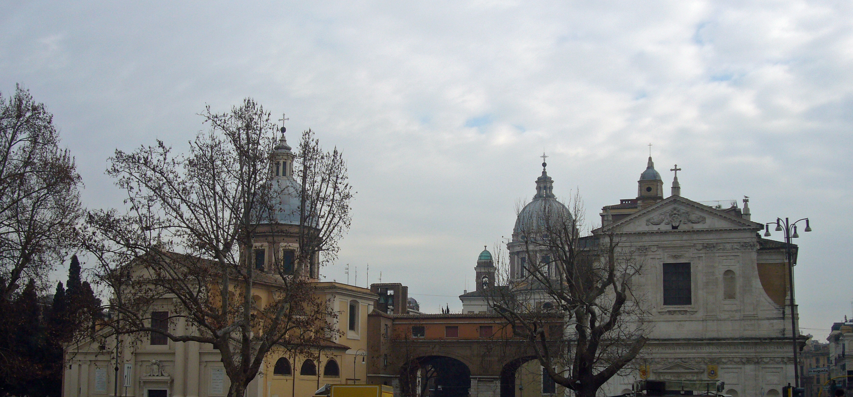 Roma, lungotevere in Augusta. Da sinistra: S. Rocco all'Augusteo (col campanile a vela), in secondo piano campanile e cupola di S. Carlo al Corso, a destra S. Girolamo dei Croati con campaniletto sul fondo.